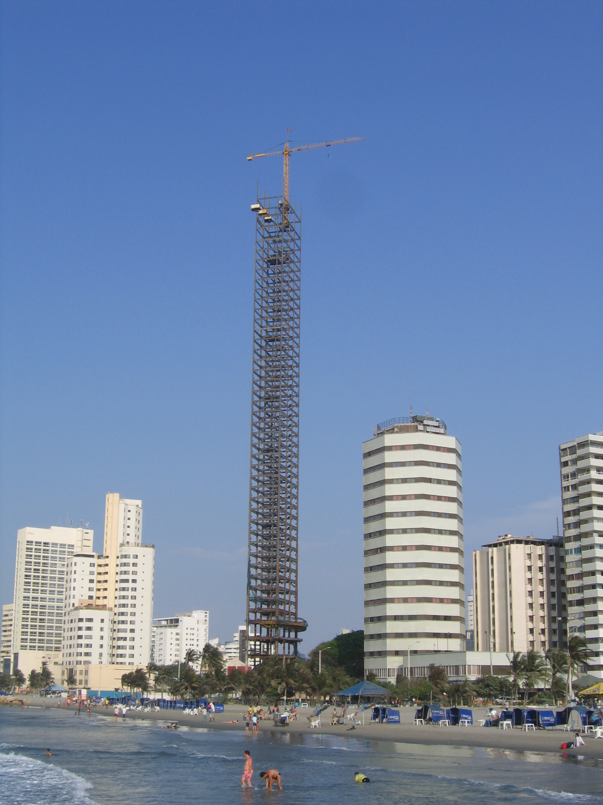 Todo iba bien